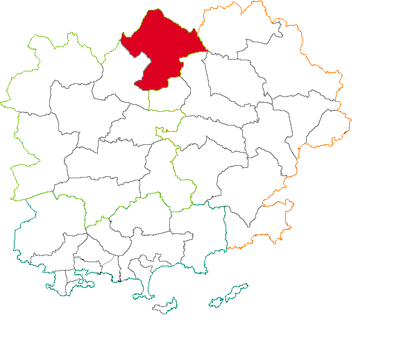 Situation du canton dans le département du Var